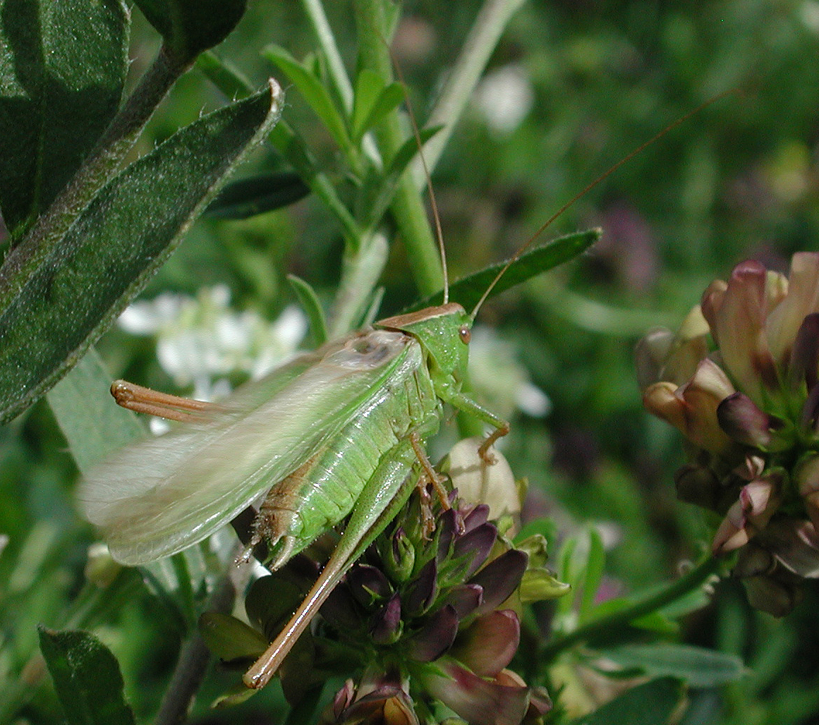 Metrioptera bicolor, forma diluta, stridulating male, Zweifarbige Beißschrecke, makroptere Form, Wildau, Brandenburg, Germany